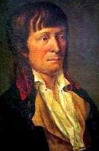 Porträt des Arztes Bernhard Christoph Faust (1755-1842), Gemälde eines unbekannten Malers